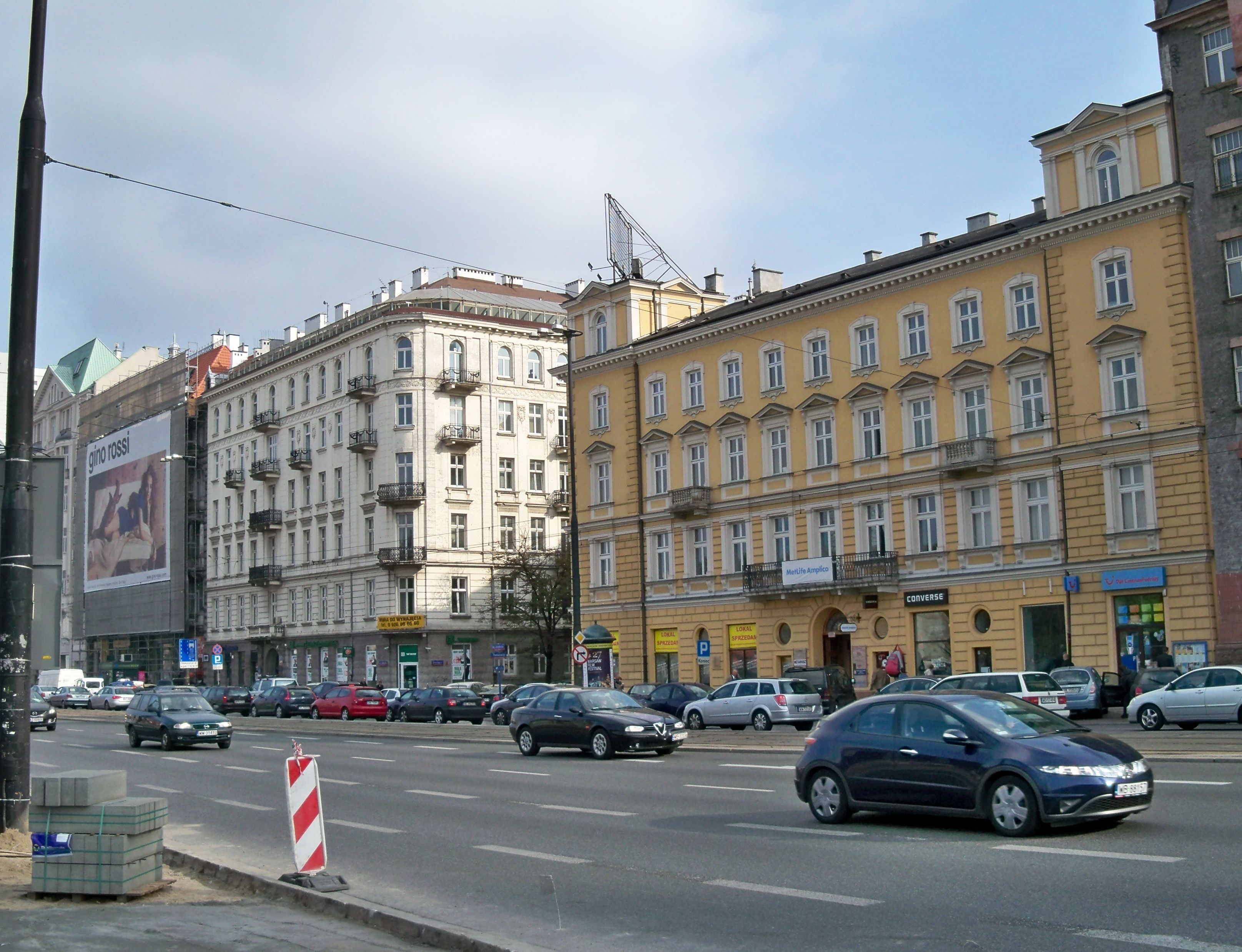 Al. Jerozolimskie, róg Pankiewicza, Warszawa